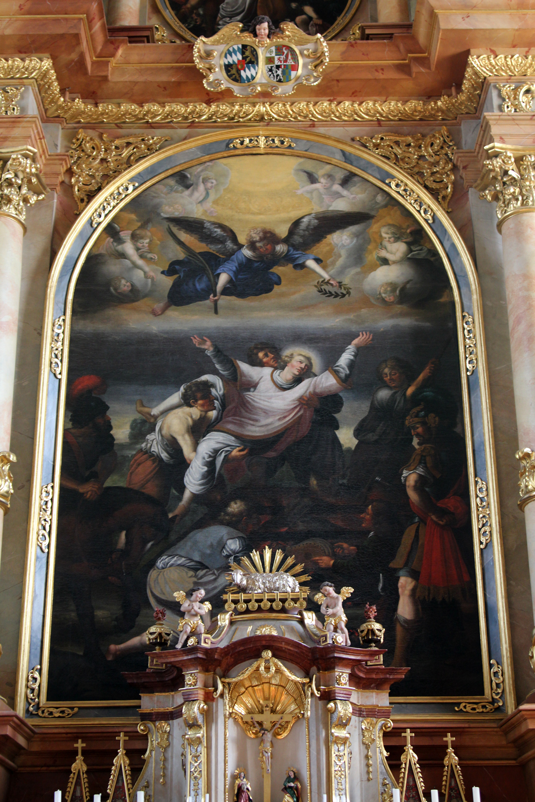 Hochaltarbild in der Pfarrkirche St. Laurentius Altheim, OÖ